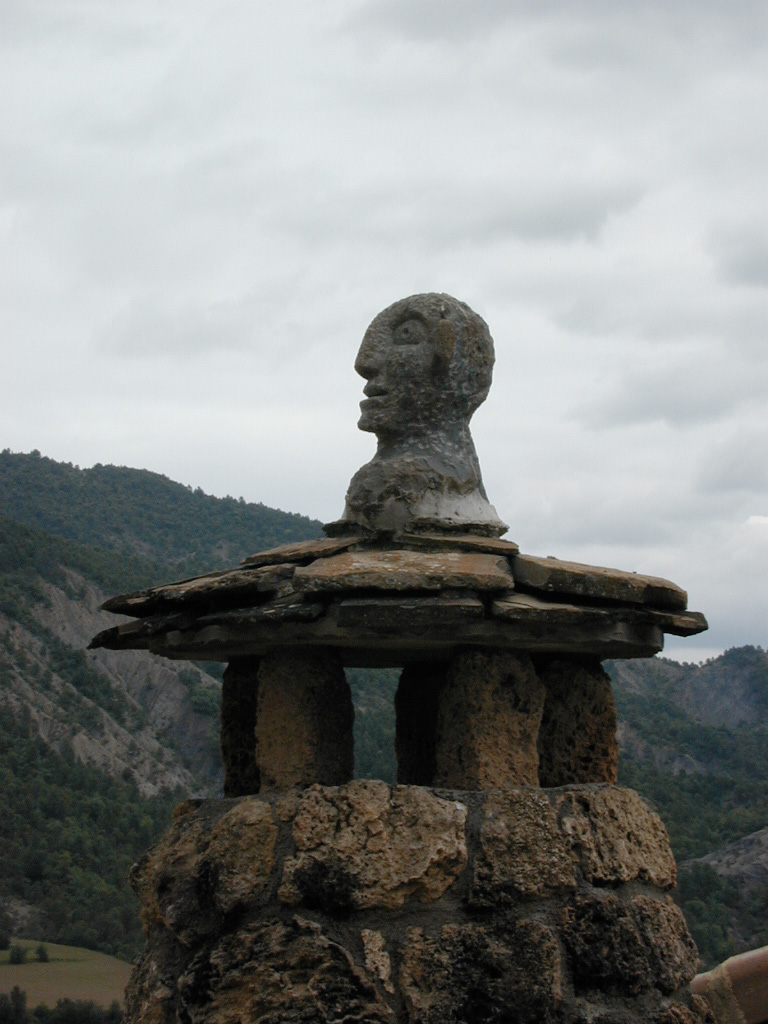 Chimenea tradicional o chaminera con espantabrujas